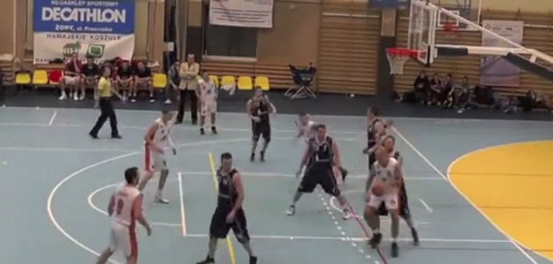 Mecz Pogoni Prudnik z Hawajskimi Koszulami Żory w dniu 20 grudnia 2011.